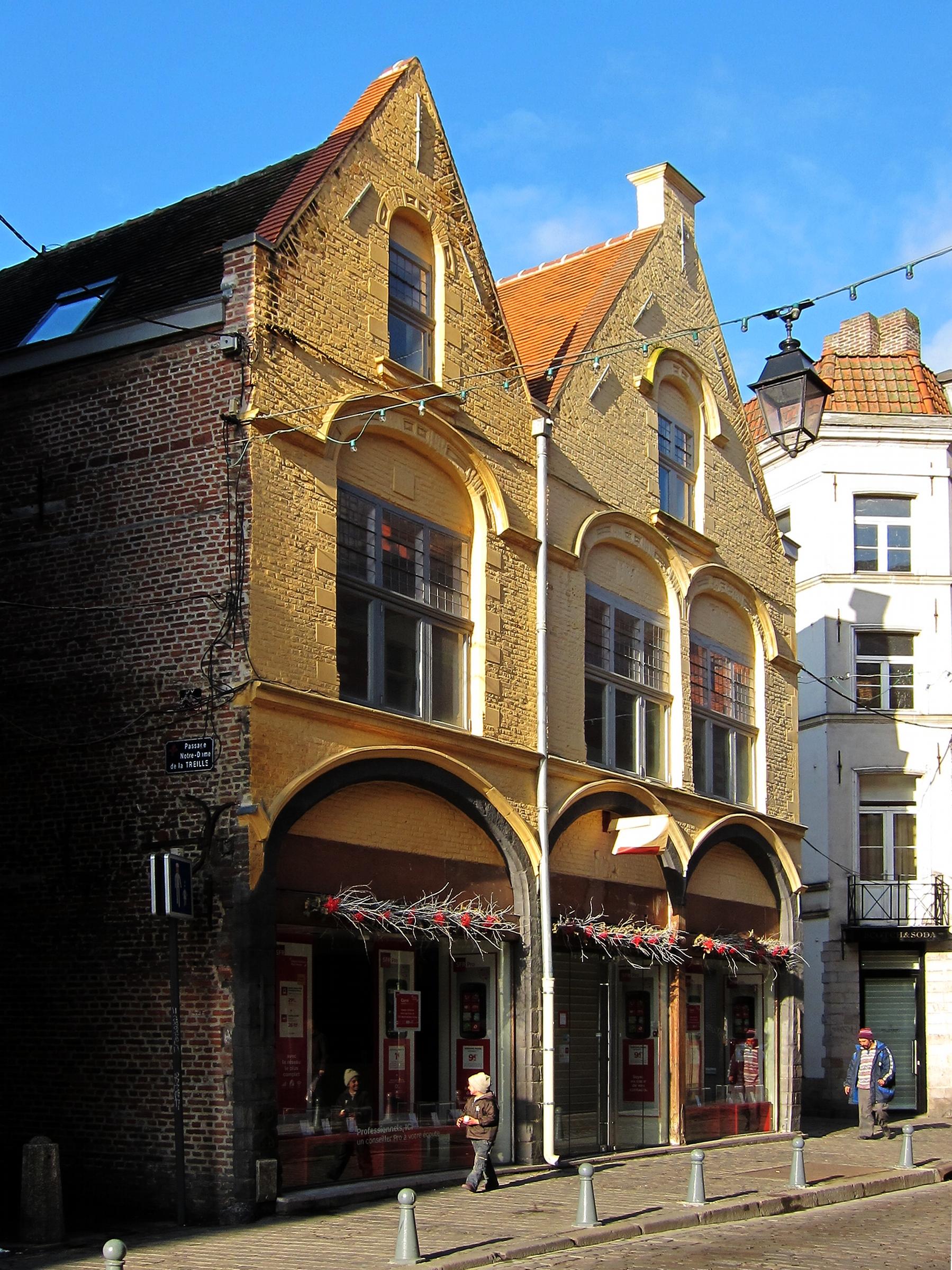 Maisons 35, 37 rue de la Monnaie à Lille.